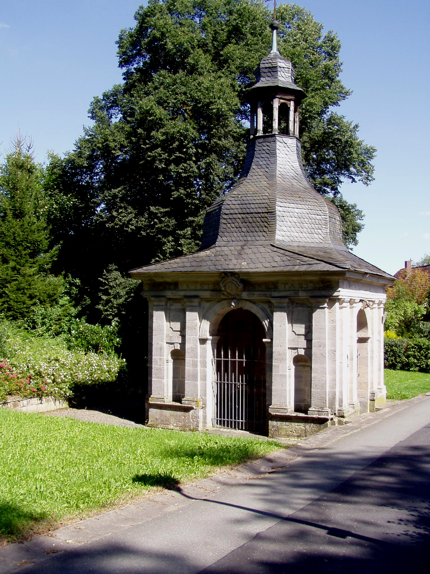 Heiligblutbrunnen, 1690 von L.Dienzenhofer entworfen